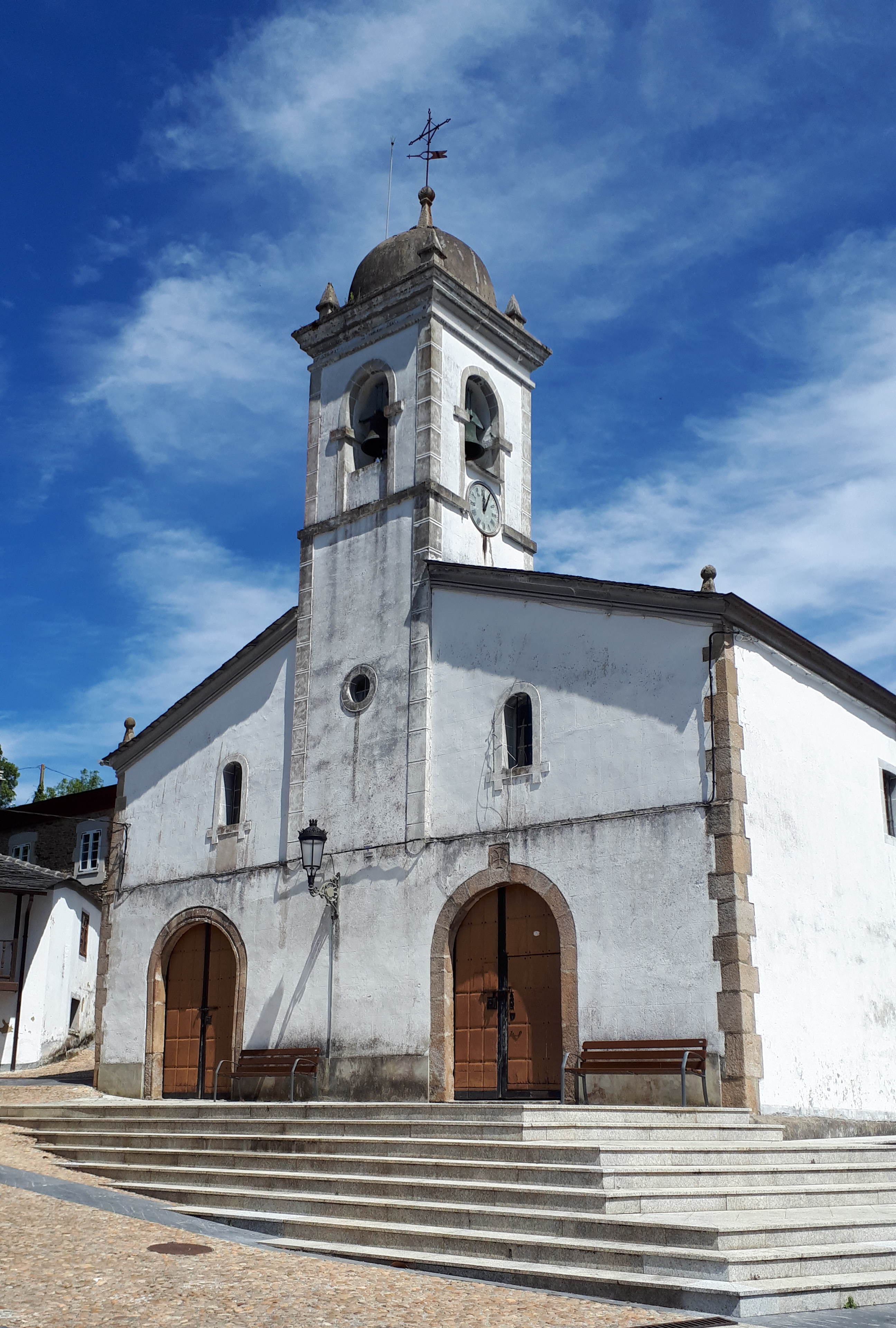 Iglesia de San Esteban en Piantón, en el Concejo de Vegadeo (Asturias - España). Construida en el siglo XI como templo de la orden de Malta, y reformada entre los siglos XVI y XVIII. Contiene un valioso retablo barroco, traído de la capilla de La Rúa de Abres, y destacada la imaginería de los santeiros locales del XIX.